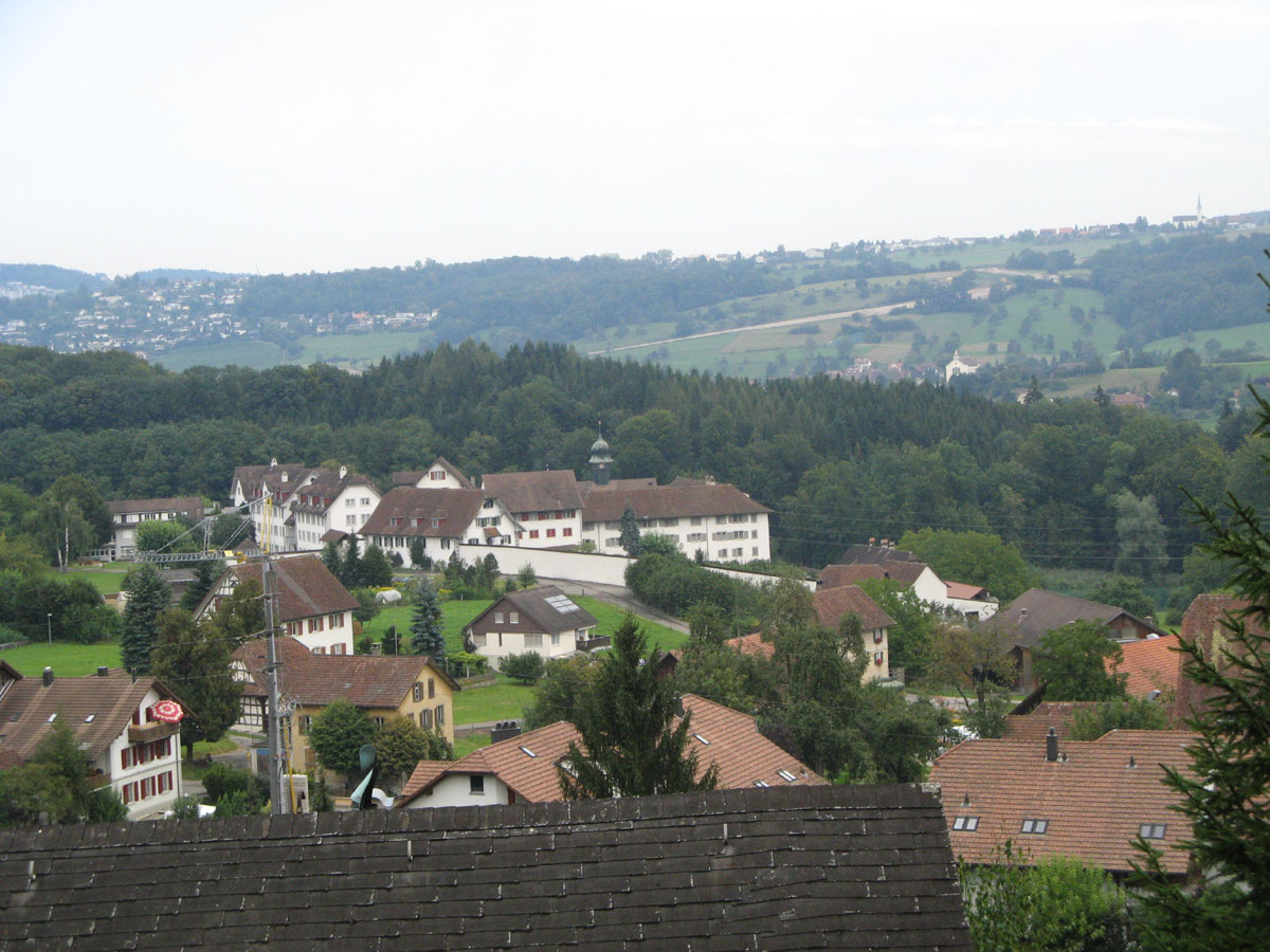 Hermetschwil